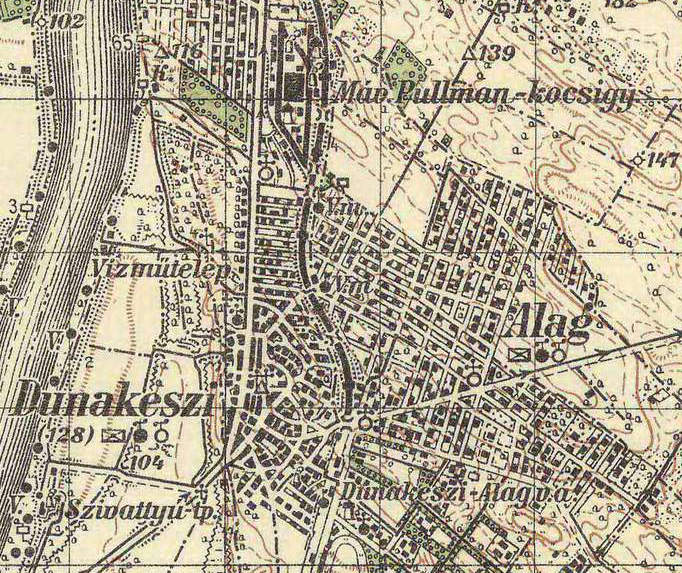 Dunakeszi Banktelep térkép 1941